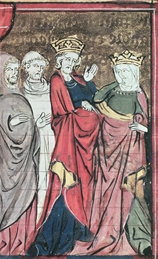 Répudiation d'Adélaïde de Montferrat